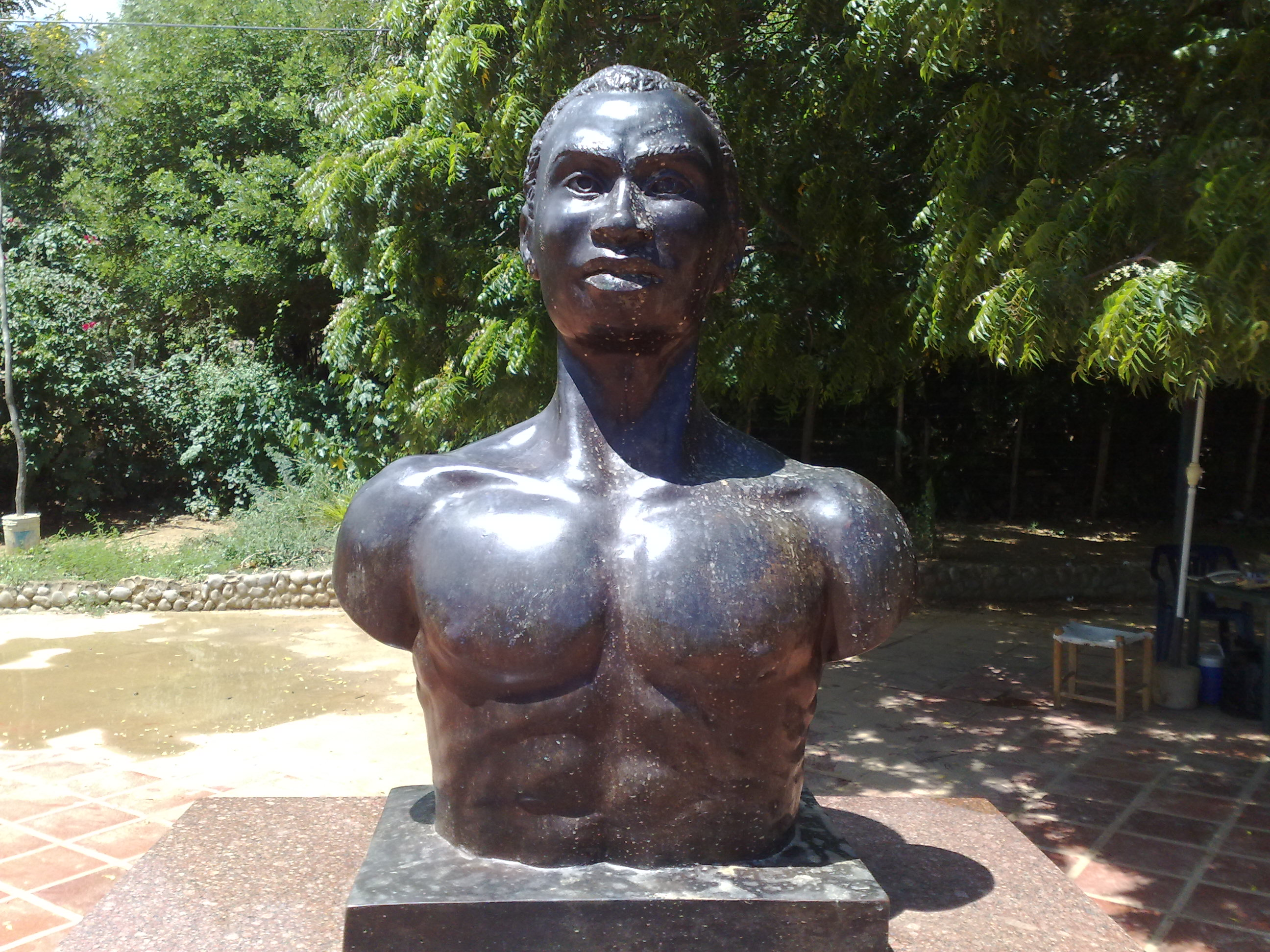 Busto de José Leonardo Chirino en Caujarao, Estado Falcón.